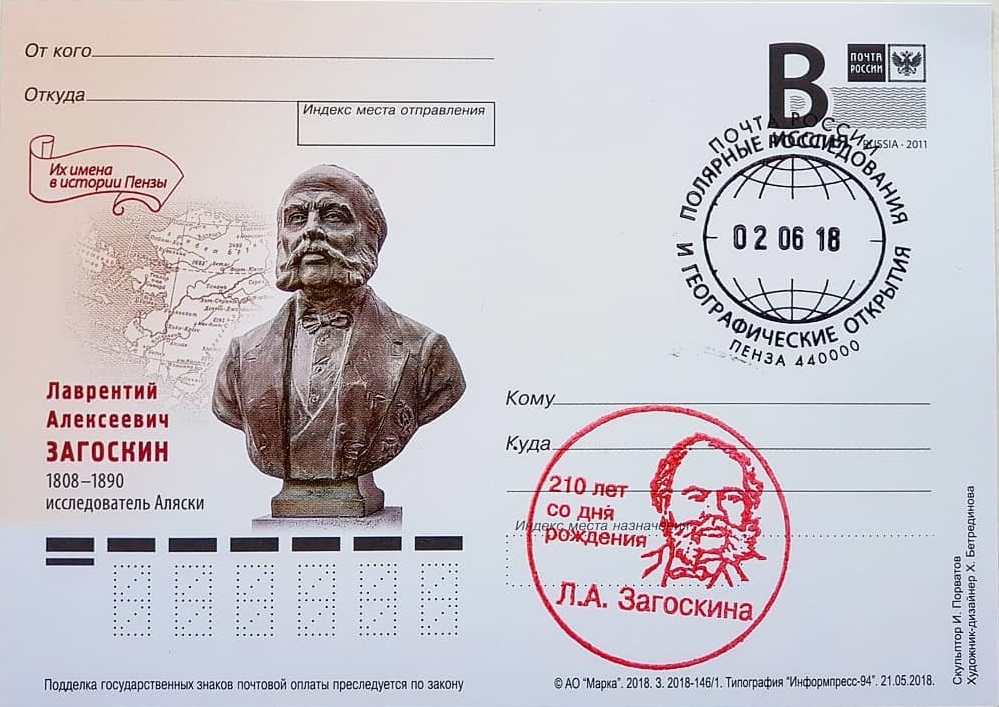 Почтовая карточка № 2018-146/1. Их имена в истории Пензы. Л.А. Загоскин (1808-1890), исследователь Аляски (гашёная)